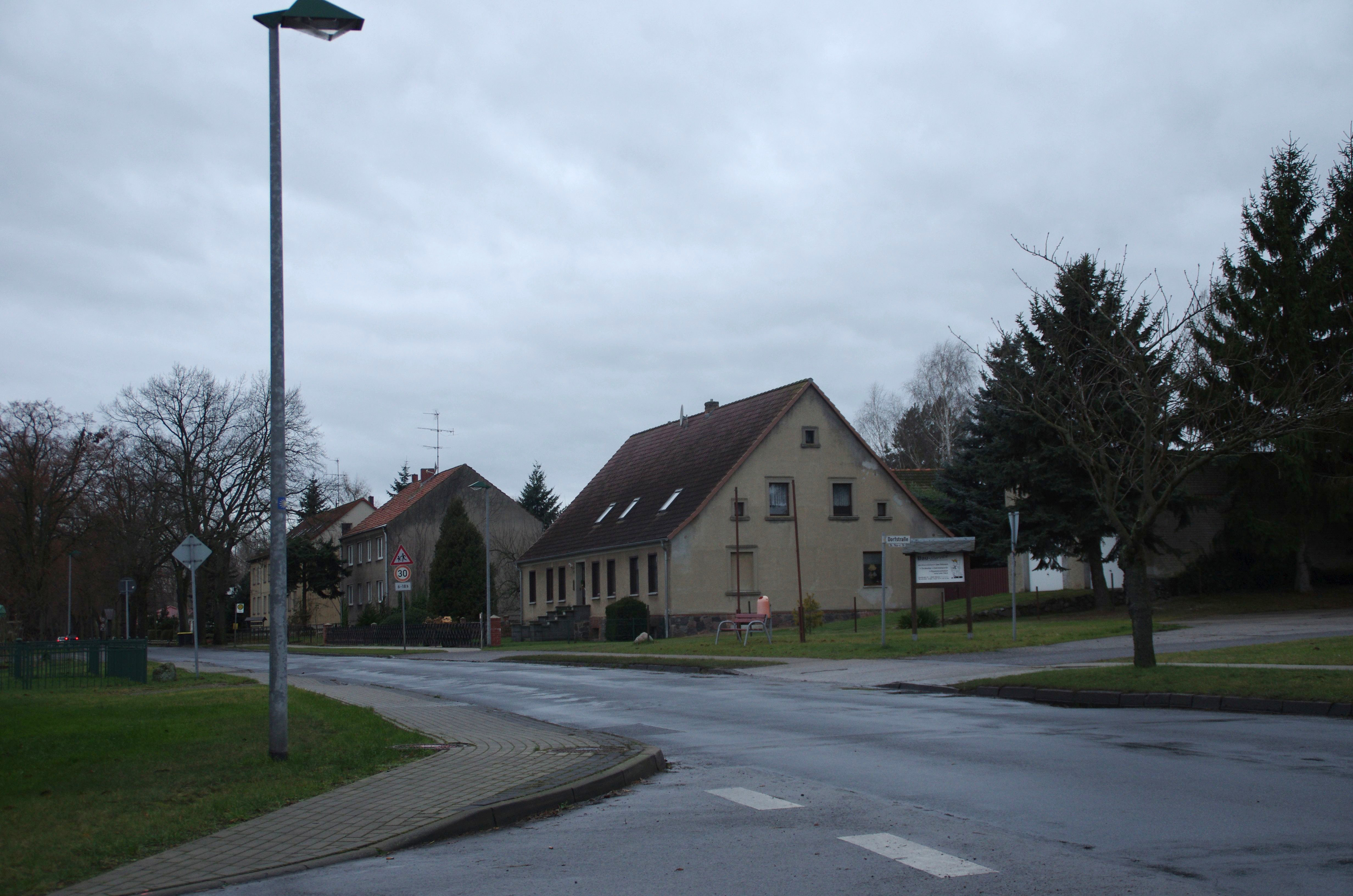 Fehrbellin in Brandenburg. Die Dorfstraße in Manker ist die Hauptstraße.